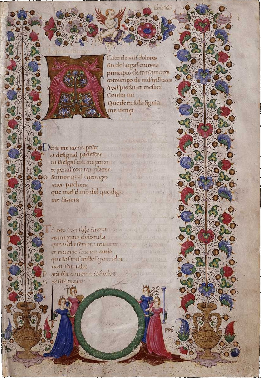 Cancionero de Stúñiga (Manuscrito, f. 1r). Contiene la poesía de la corte napolitana de Alfonso V de Aragón, llamado «el Magnánimo». El manuscrito fue confeccionado para la corte de Fernando (o Ferrante) I de Nápoles en pergamino de vitela con letra humanística, capitales iluminadas en oro y policromía y orla de tipo vegetal